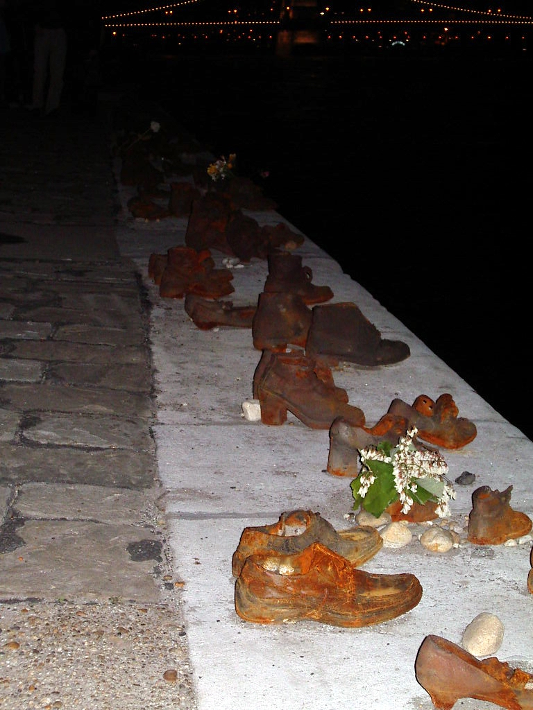 Holokauszt-emlékmű a pesti Duna-parton (részlet)